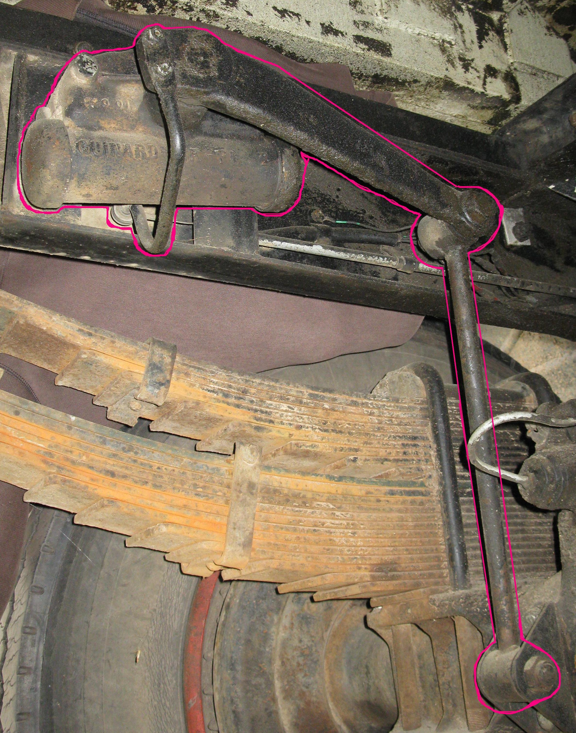 Détail d'une partie du système de répartition de freinage en fonction de la charge, sur l'essieu arrière.